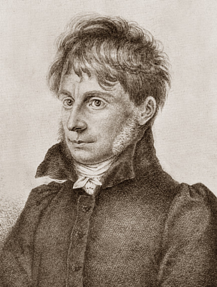 Sujet:De Joseph Görres op engem Steendrock vum Strixner no enger Zeechung vum Peter Cornelius aus der Sammlung Kippling vu Leizig, 1932.